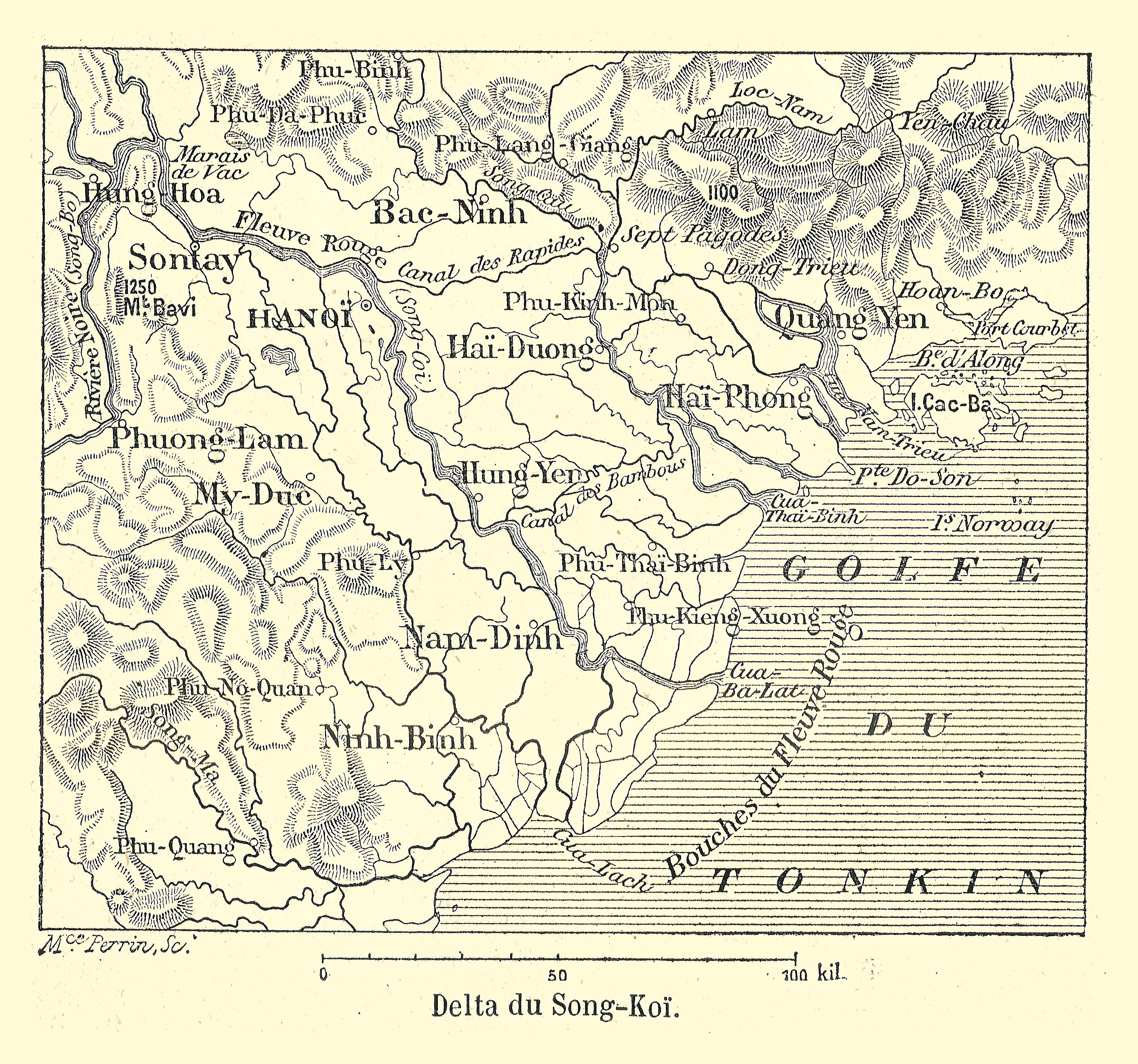 Carte de Franz Schrader